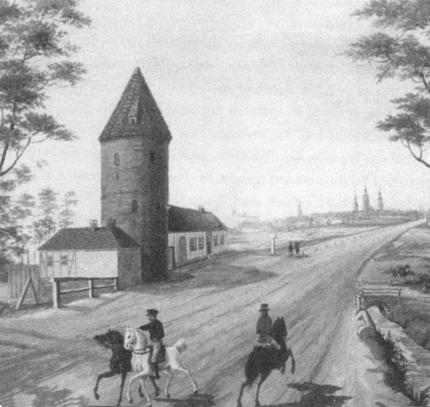 Döhrener Turm 1820 Gemälde durch den Maler Willes